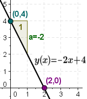 Линеарна функција експлицитен облик